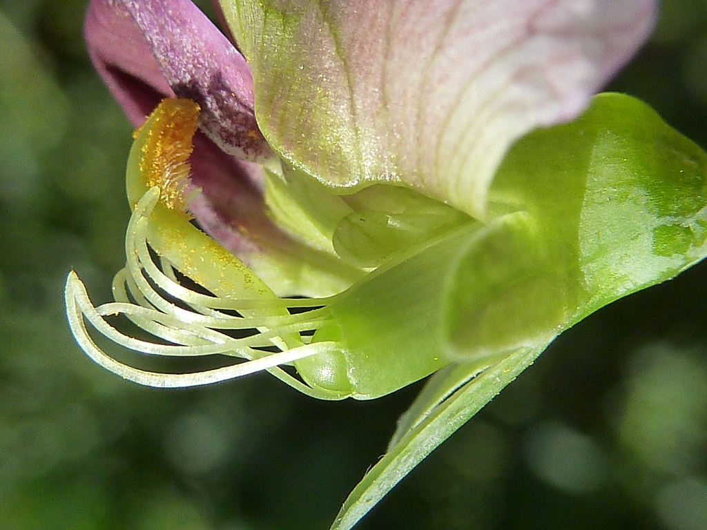 Pisum sativum (Guisante) : Flor, detalle de los aparatos reproductores (se ha quitado la quilla) - Avenida de la Libertad, Albatera (Alicante, España).